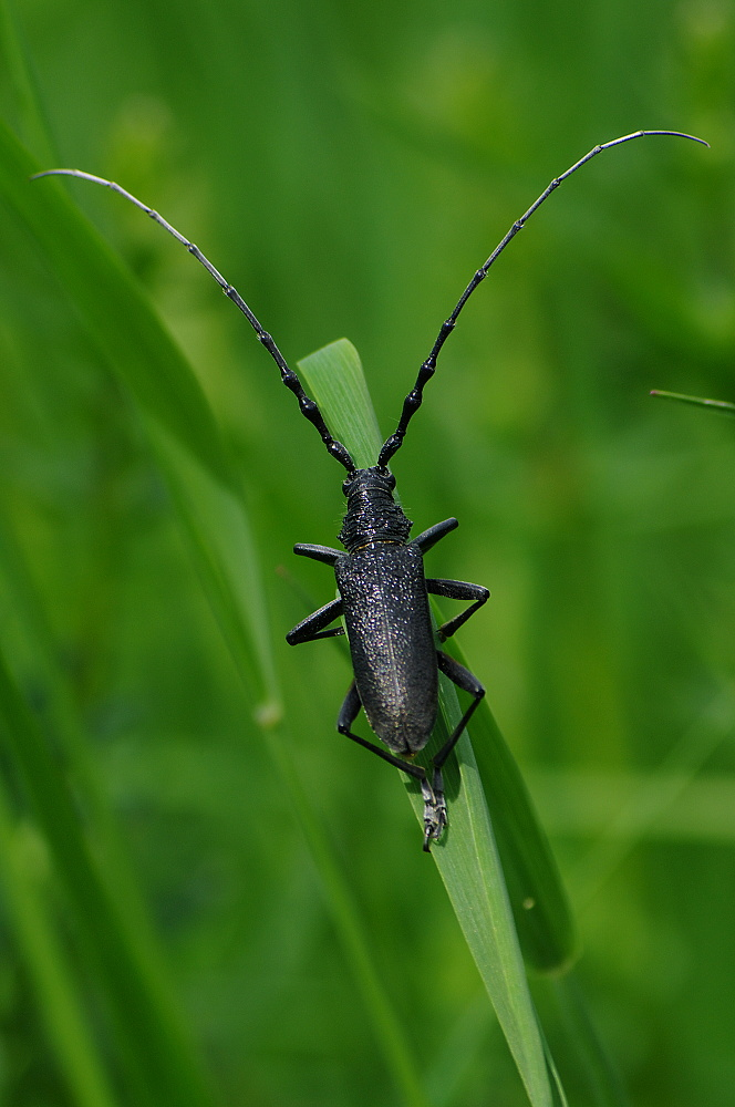 Fúzač bukový na tráve.